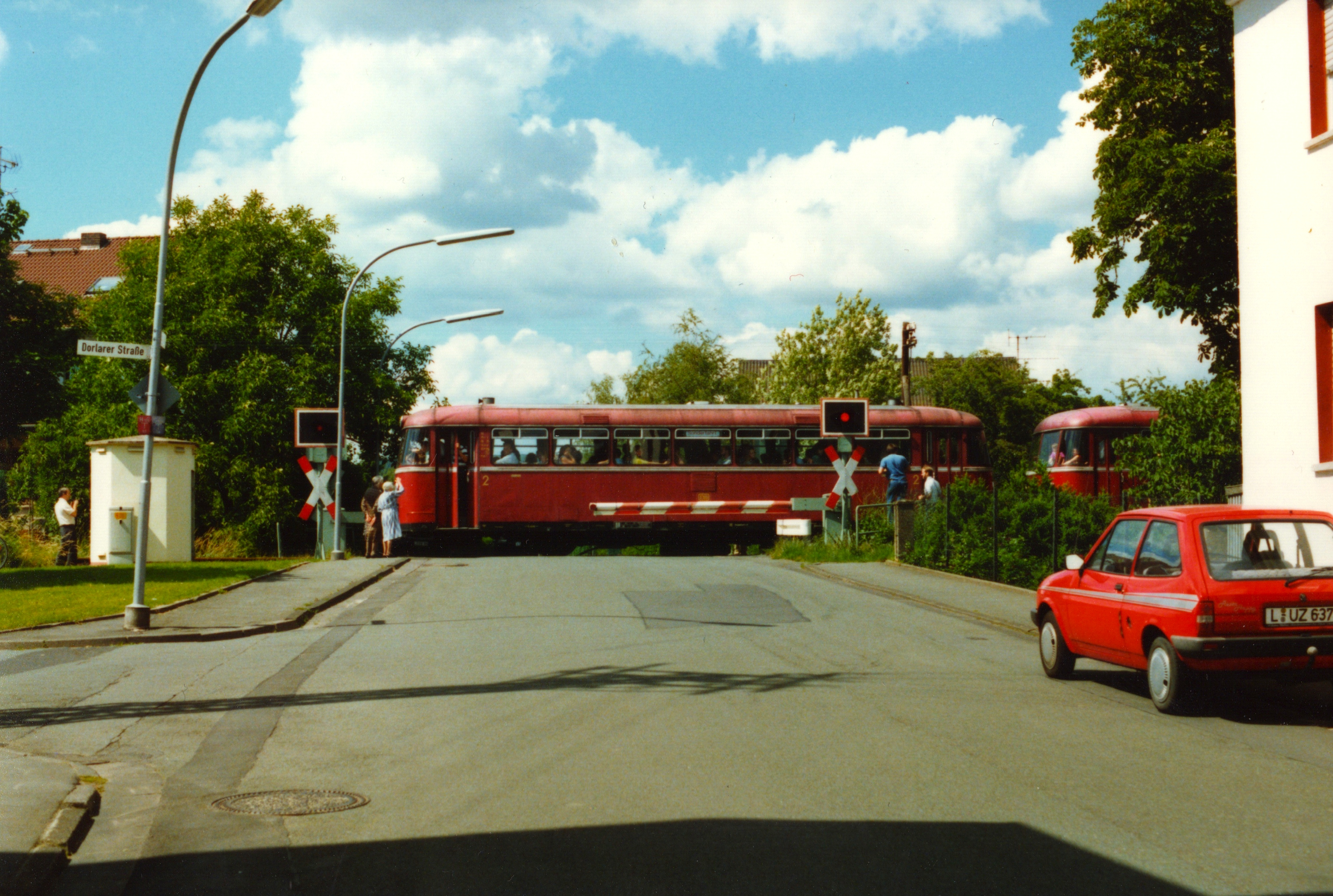 Der Bahnübergang in Atzbach bei der letzten Sonderfahrt.